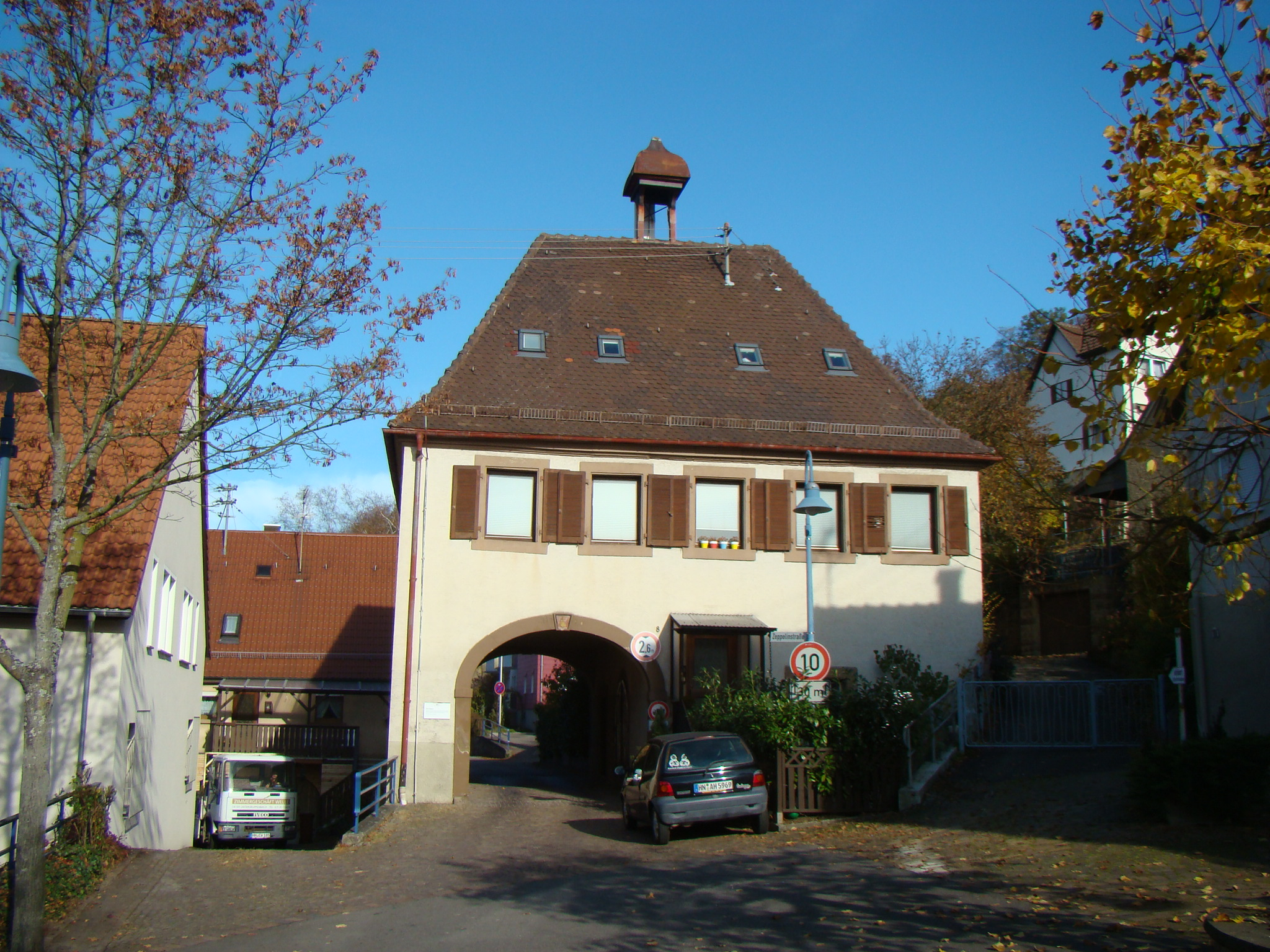 Altes Rathaus in Untergruppenbach, Foto: Peter Schmelzle 2011